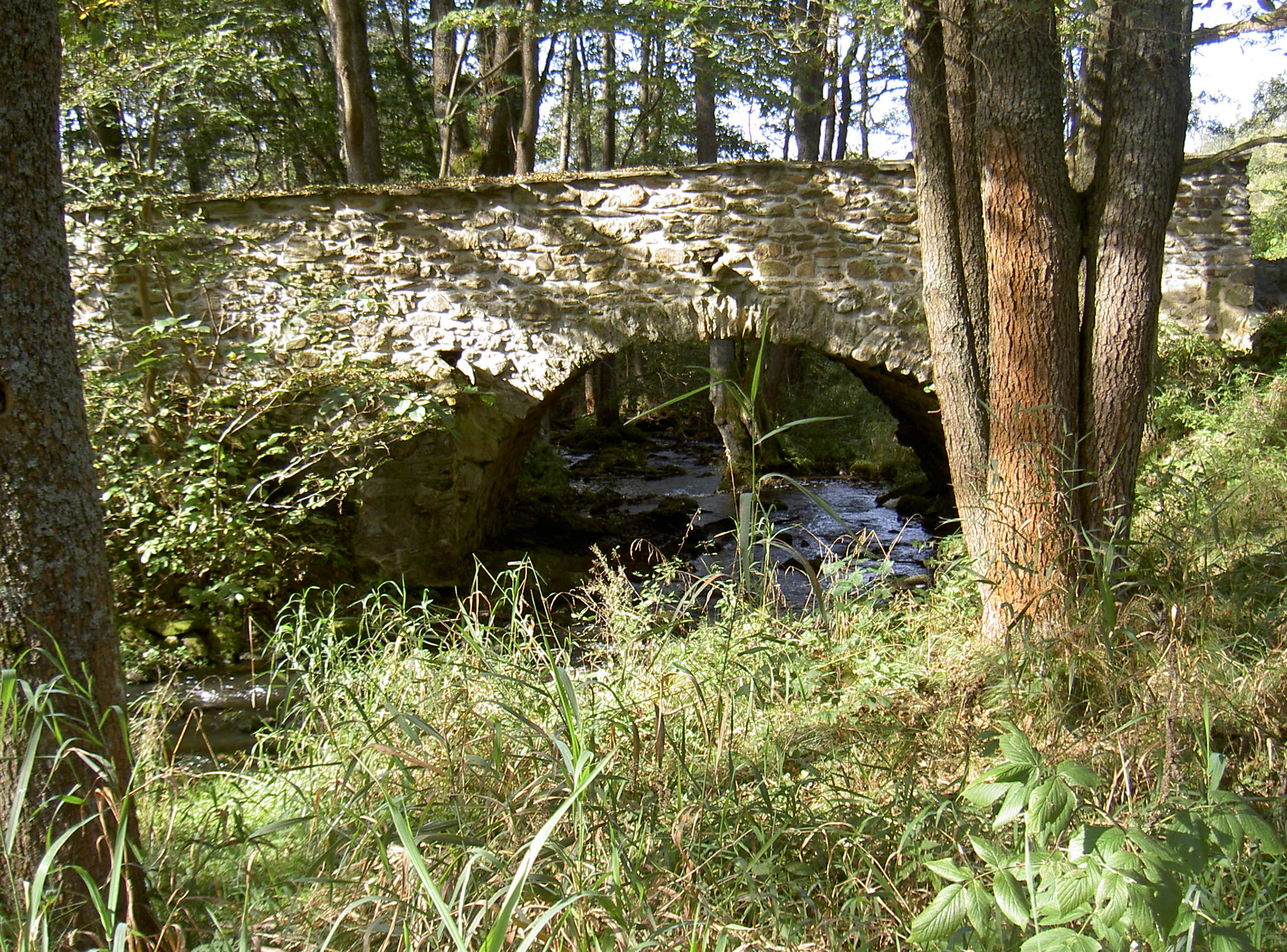 Mostek, Brücke über die Radbuza